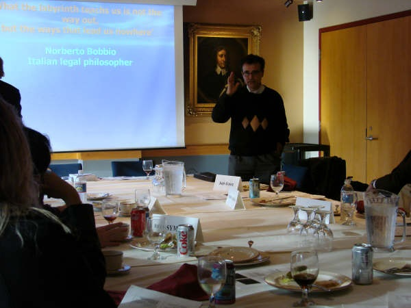 Conferência de Osvaldo Agripino de Castro Jr. em Harvard, 2008